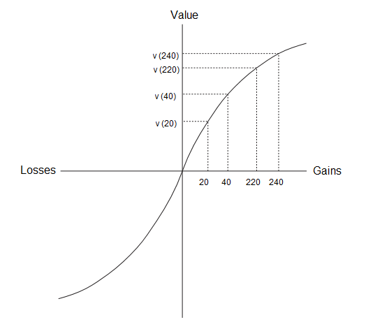 Die Wertefunktion der Prospect Theory in Anlehnung an Hanno Beck (2014): Behavioral Economics, S.130